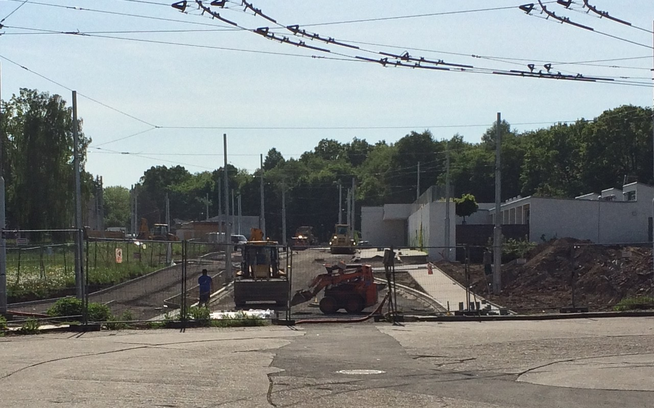 Stavba dopravního uzlu Ostrava-Hulváky, stav k 11. květnu 2015 (výřez z obrázku).